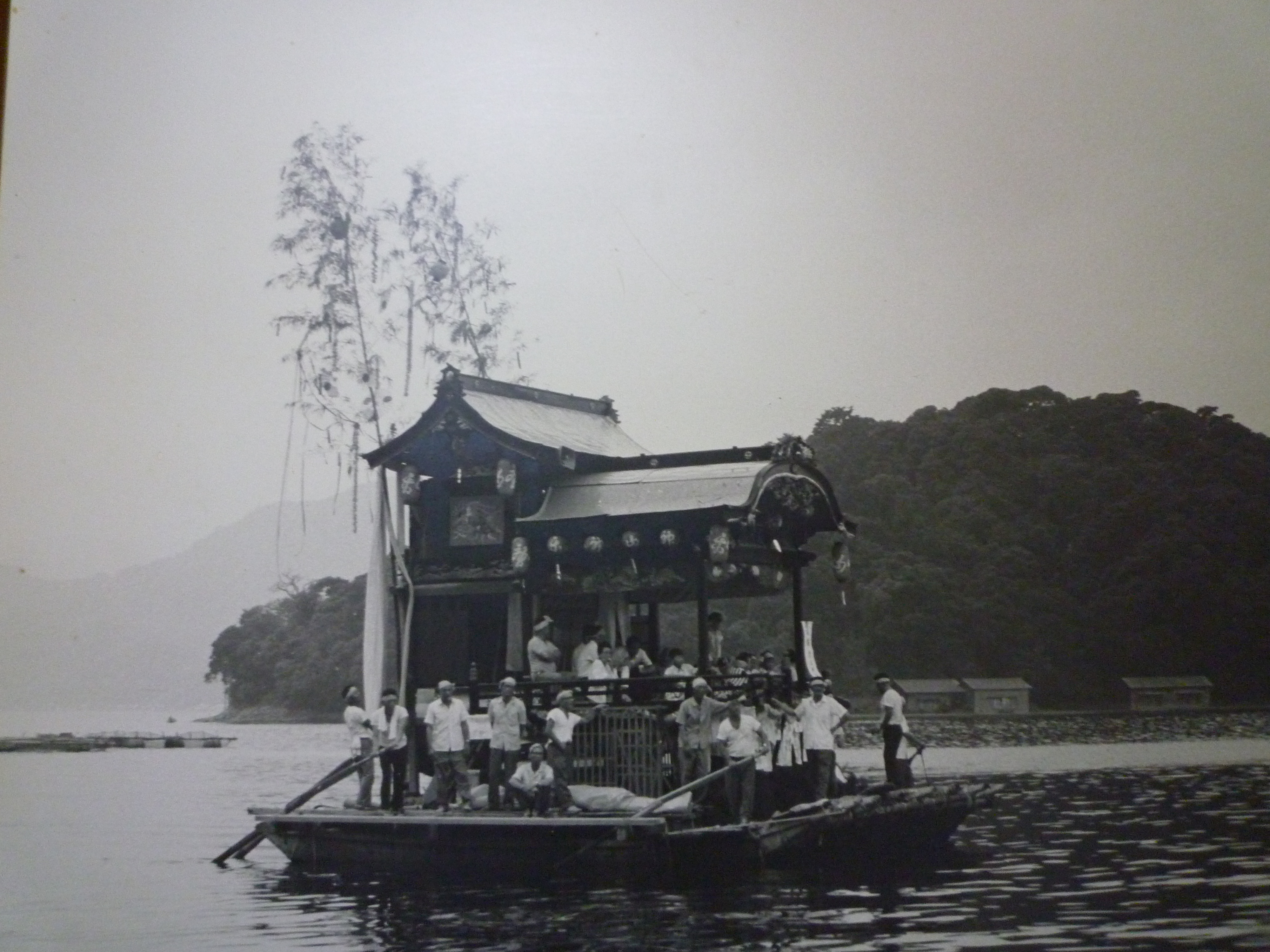 伊根祭の船屋台（京都府与謝郡伊根町）